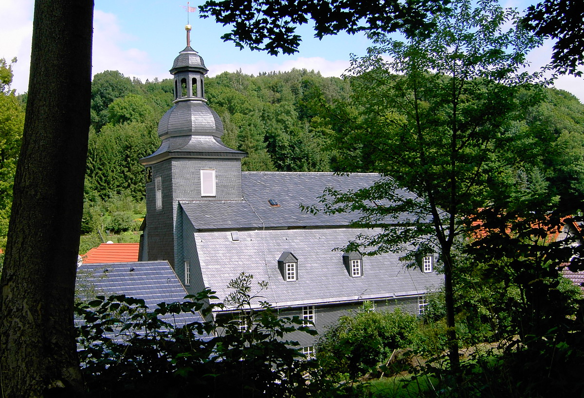 Kirche in Goldlauter (Pochwerksgrund) Quelle: eigenes Foto von Nutzer jottvau